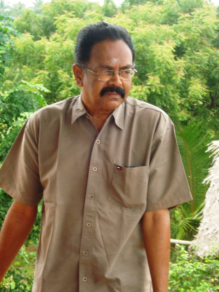 வண்ணதாசன் என்னும் கல்யாண்ஜி என்னும் சு. கலியாணசுந்தரம்